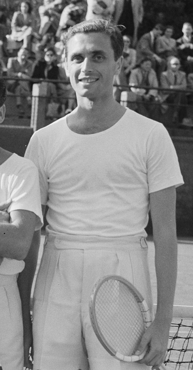 Tennis op de METS-banen: Nederland tegen Brazilië. Saller